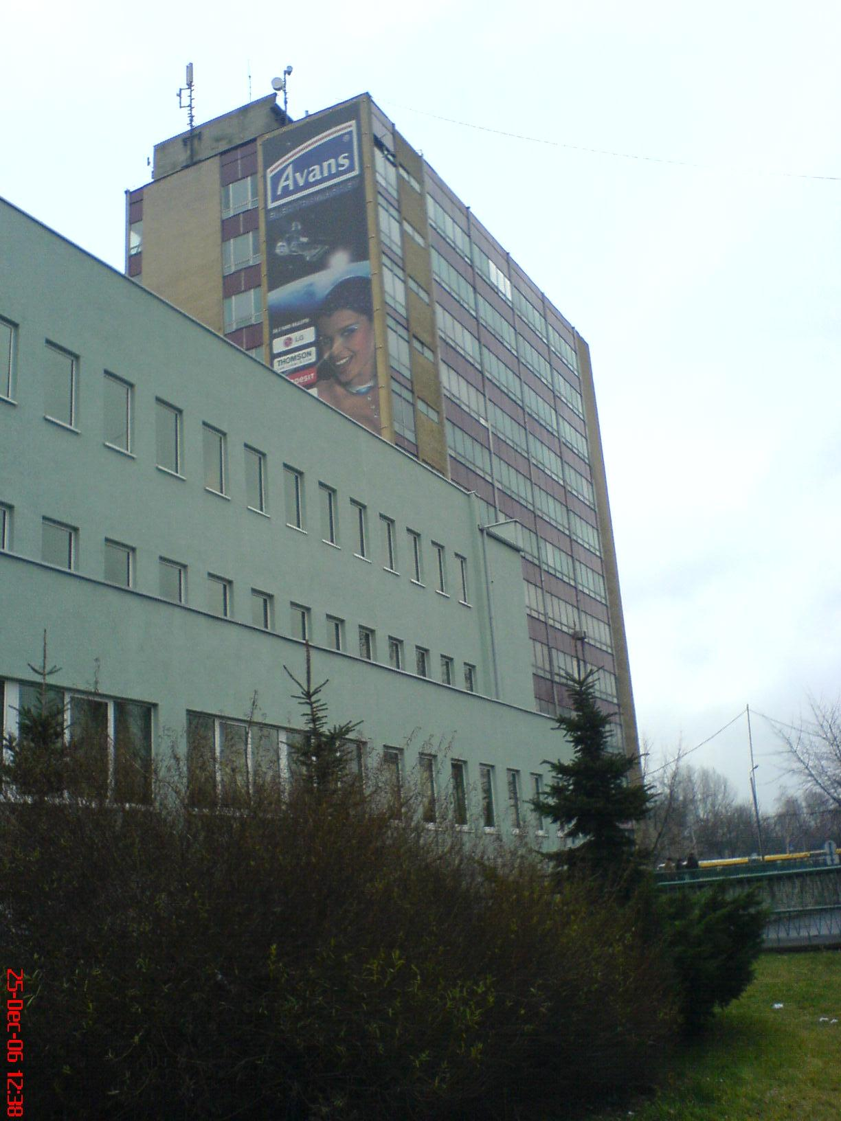 Rybnik, biurowiec Millenium.